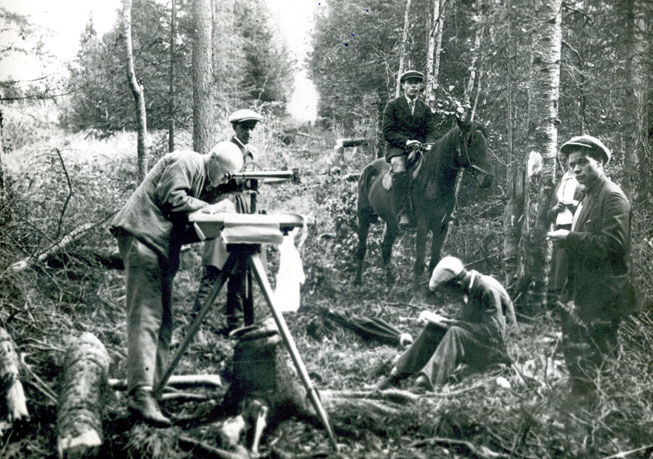 Геодезическая съемка местности для строительства СУМЗа, 1932